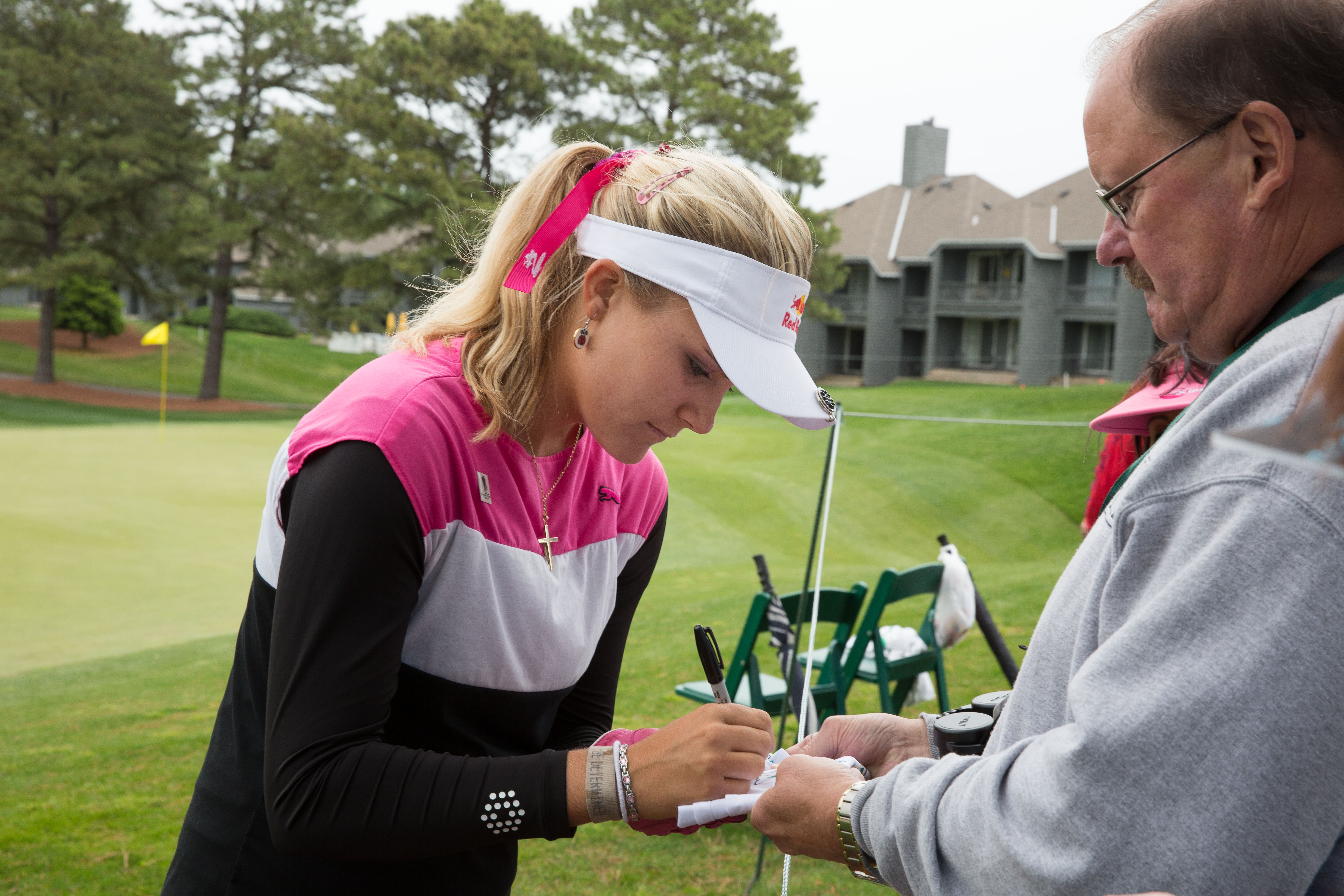 LPGA Kingsmill May 1, 2013